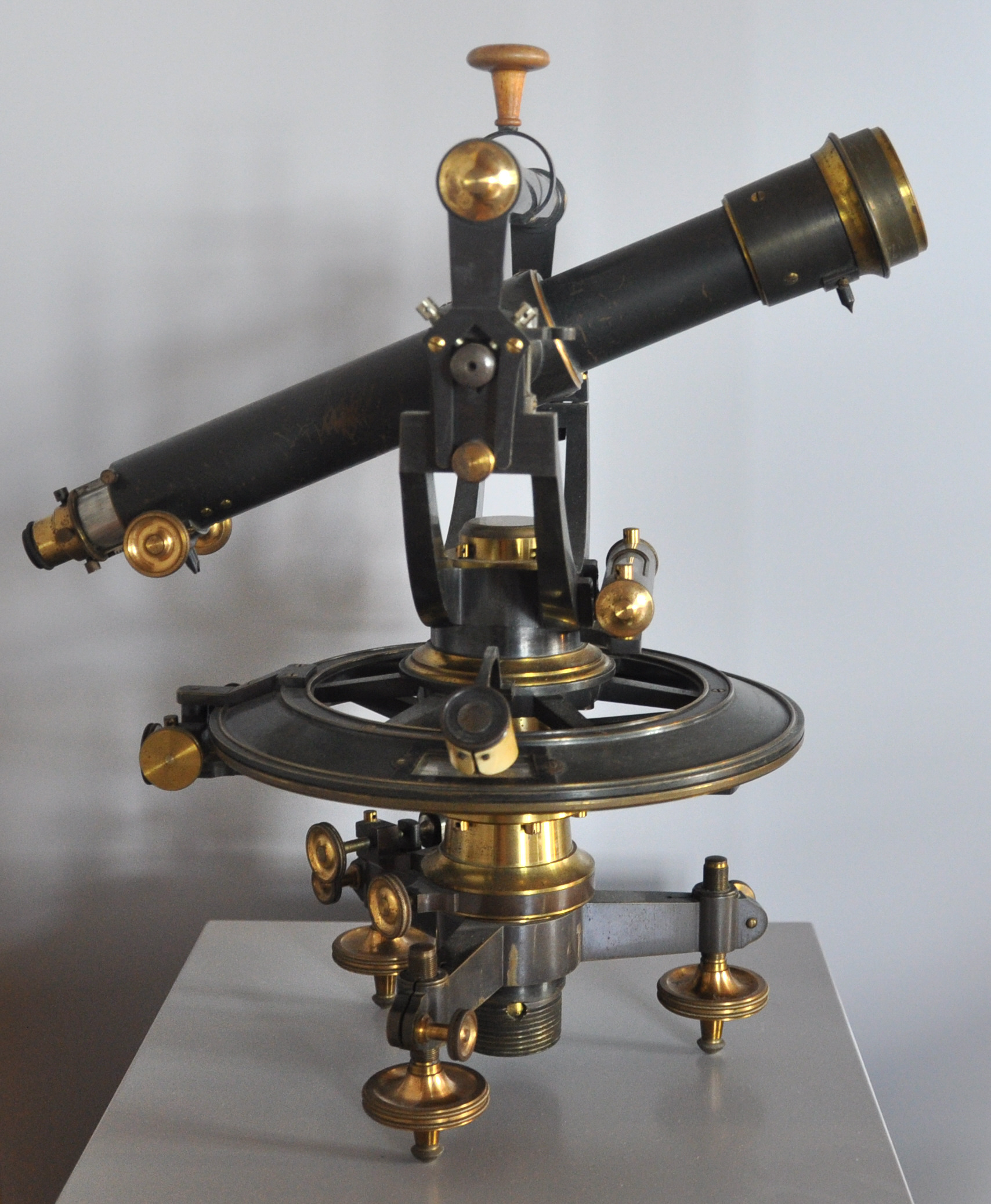 Burg Waldburg (Württemberg), Theodolit (Hersteller: Tesdorpf, Stuttgart), um 1870 (laut Beschriftung; laut Ludwig Tesdorpf wohl aber frühestens 1882, falls der Hersteller tatsächlich schon als "Tesdorpf" firmiert); Leihgabe des Staatl. Vermessungsamts Ravensburg